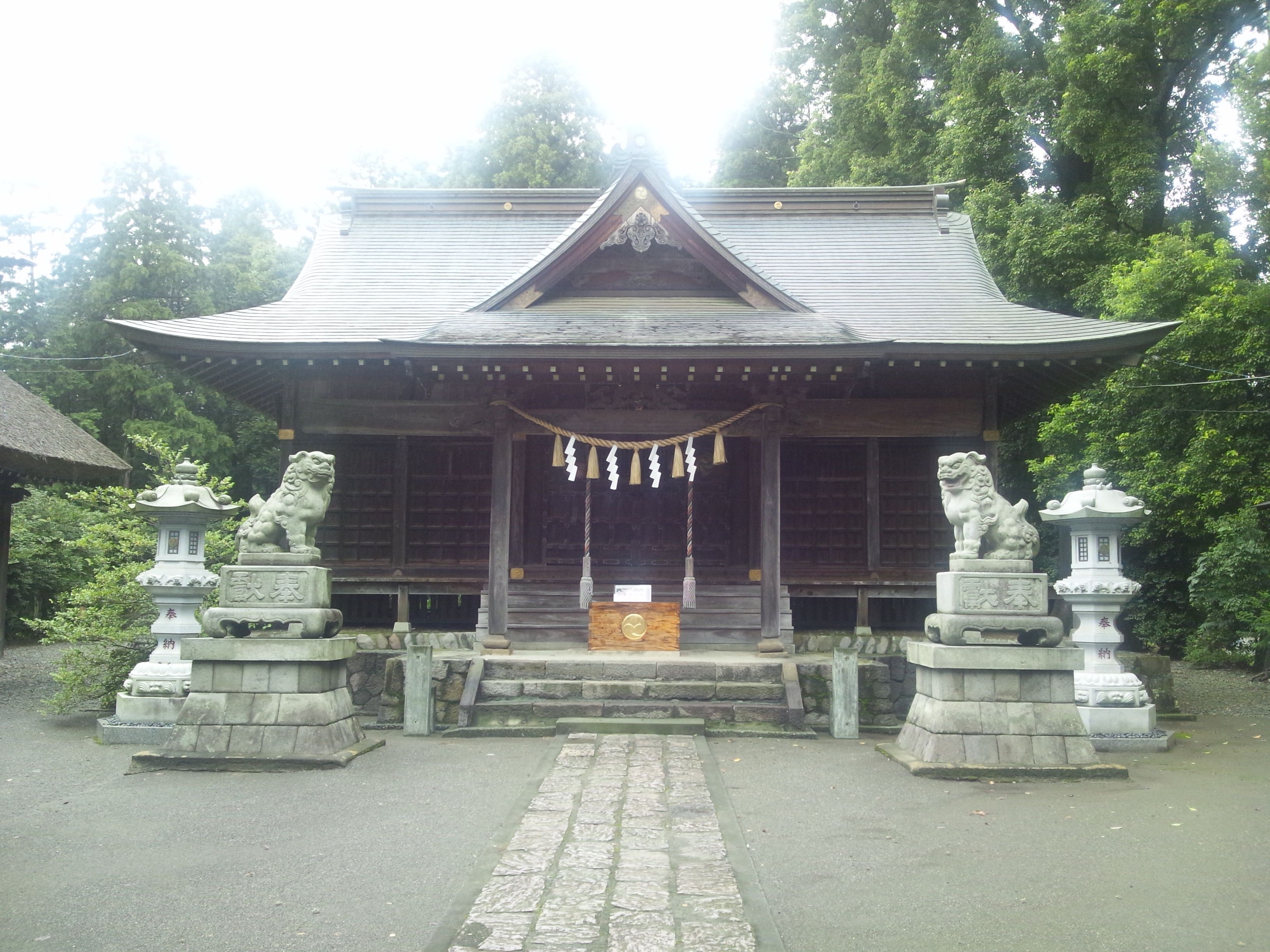 神奈川県中井町五所の宮拝殿